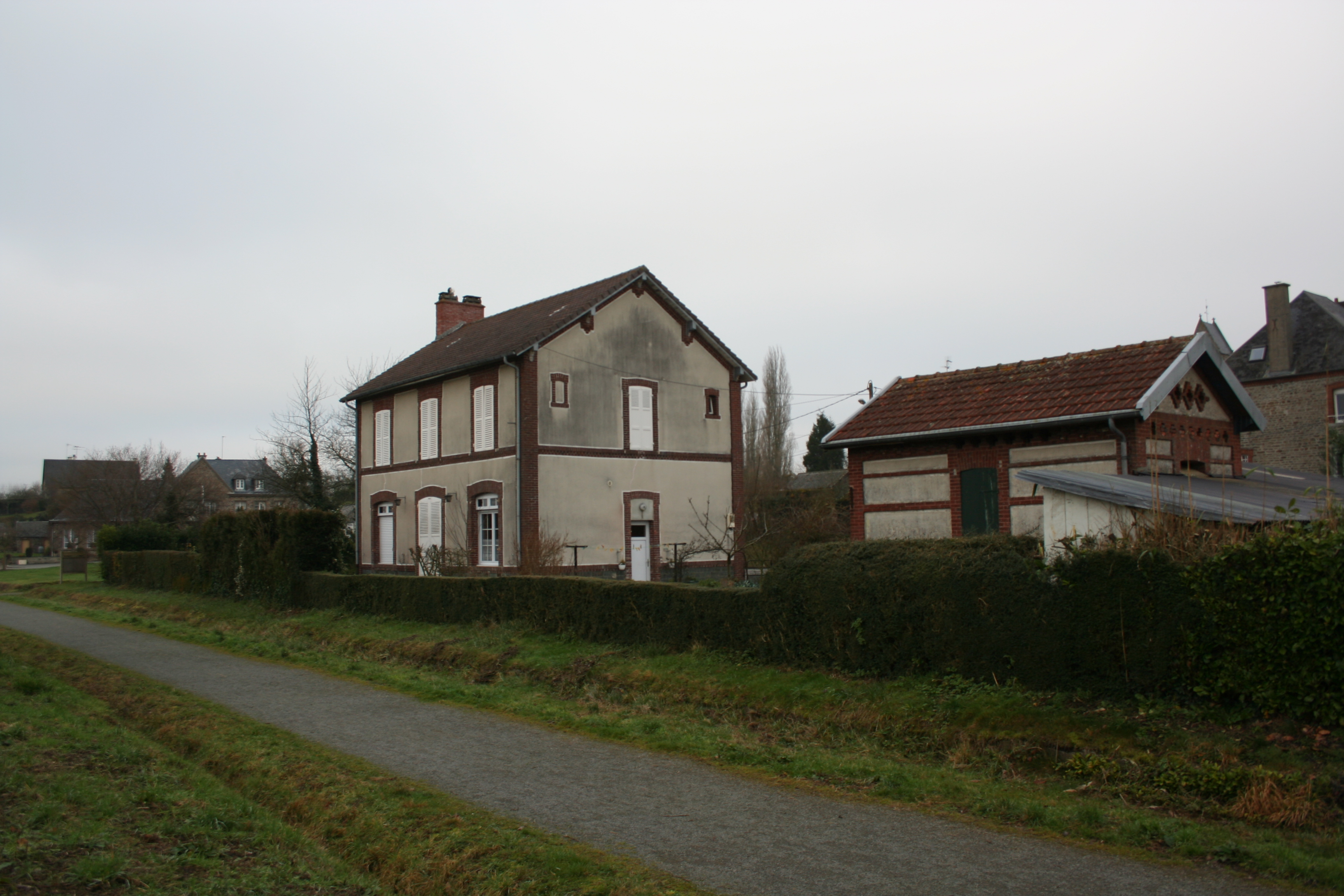 gare ferroviaire de la graverie - calvados - France